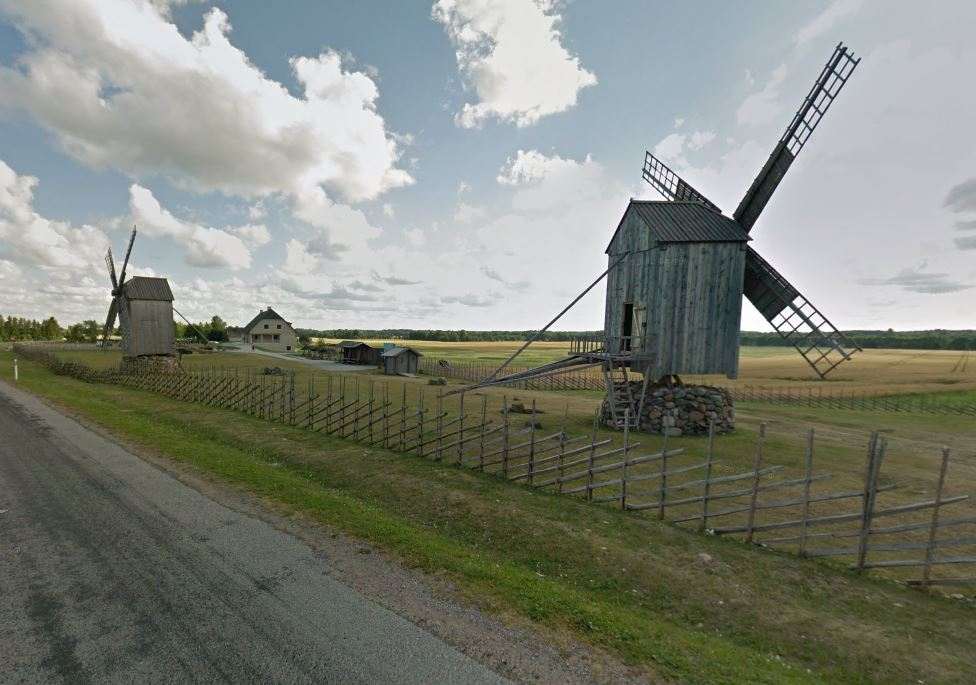 Photograpie de Angla